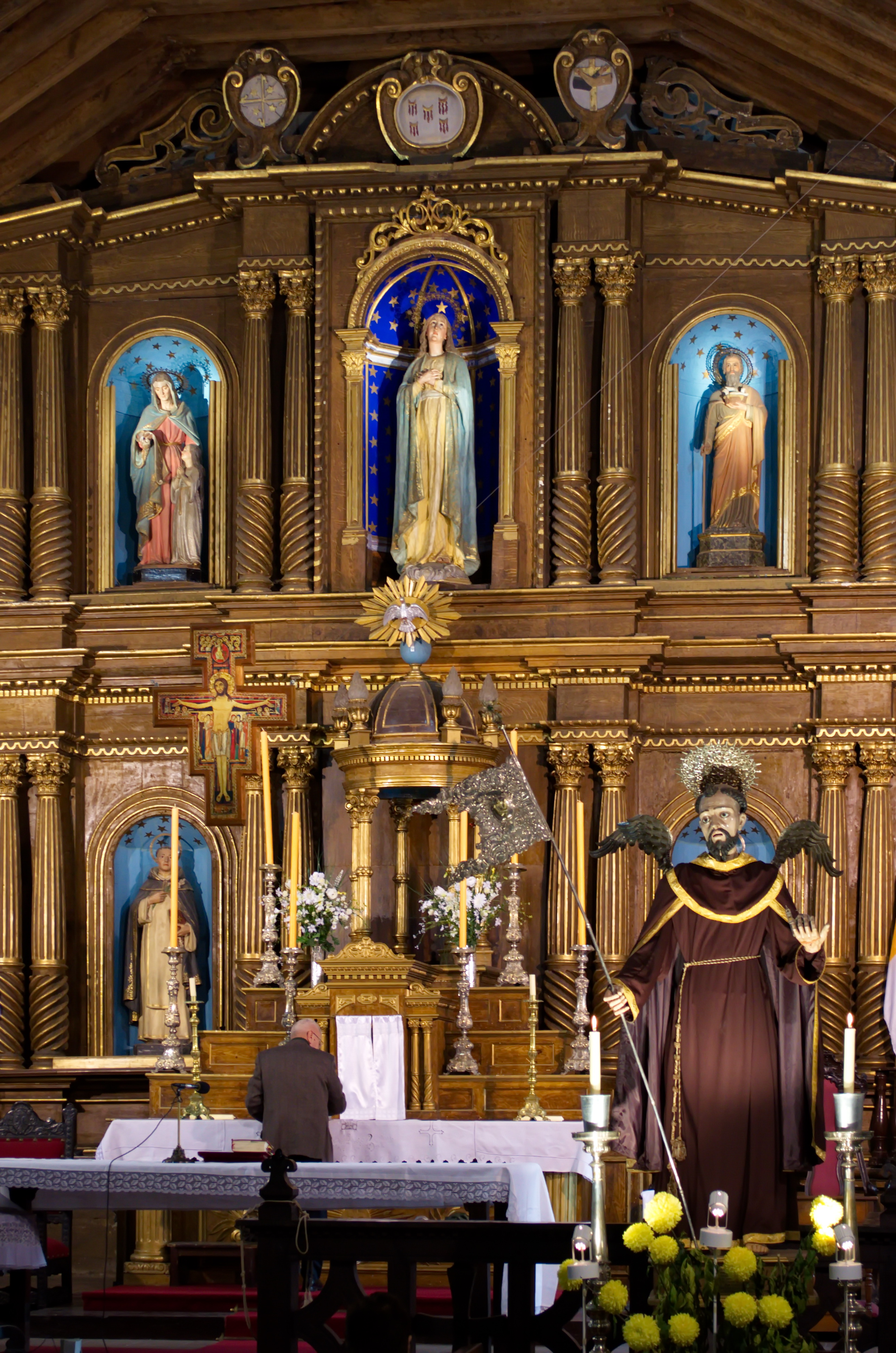 Templo y Convento de San Francisco